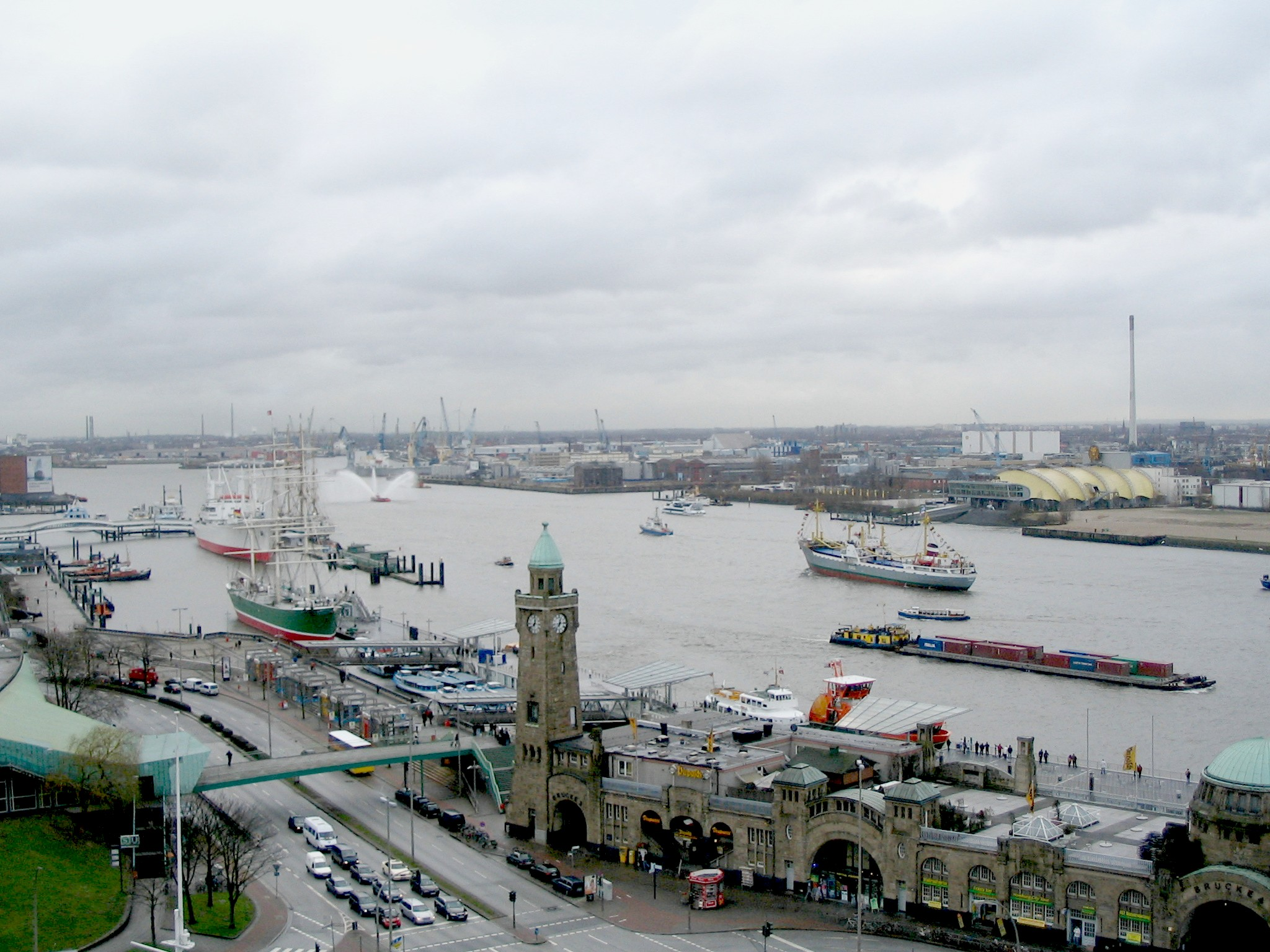 Museumsschiff Old Lady, Ankunft Hamburg Foto: Seebeer